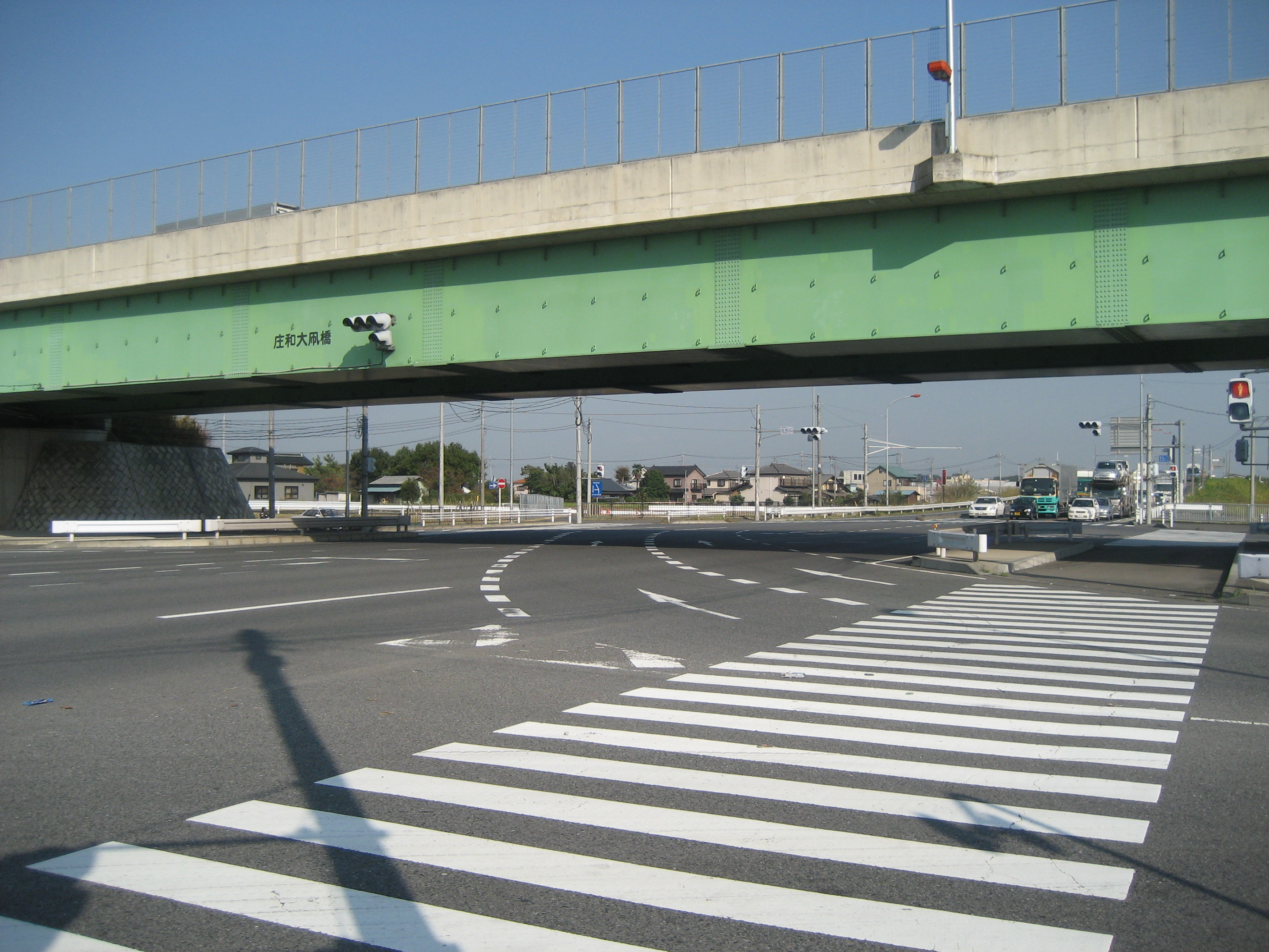 国道4・16号線春日部市庄和IC庄和大凧橋